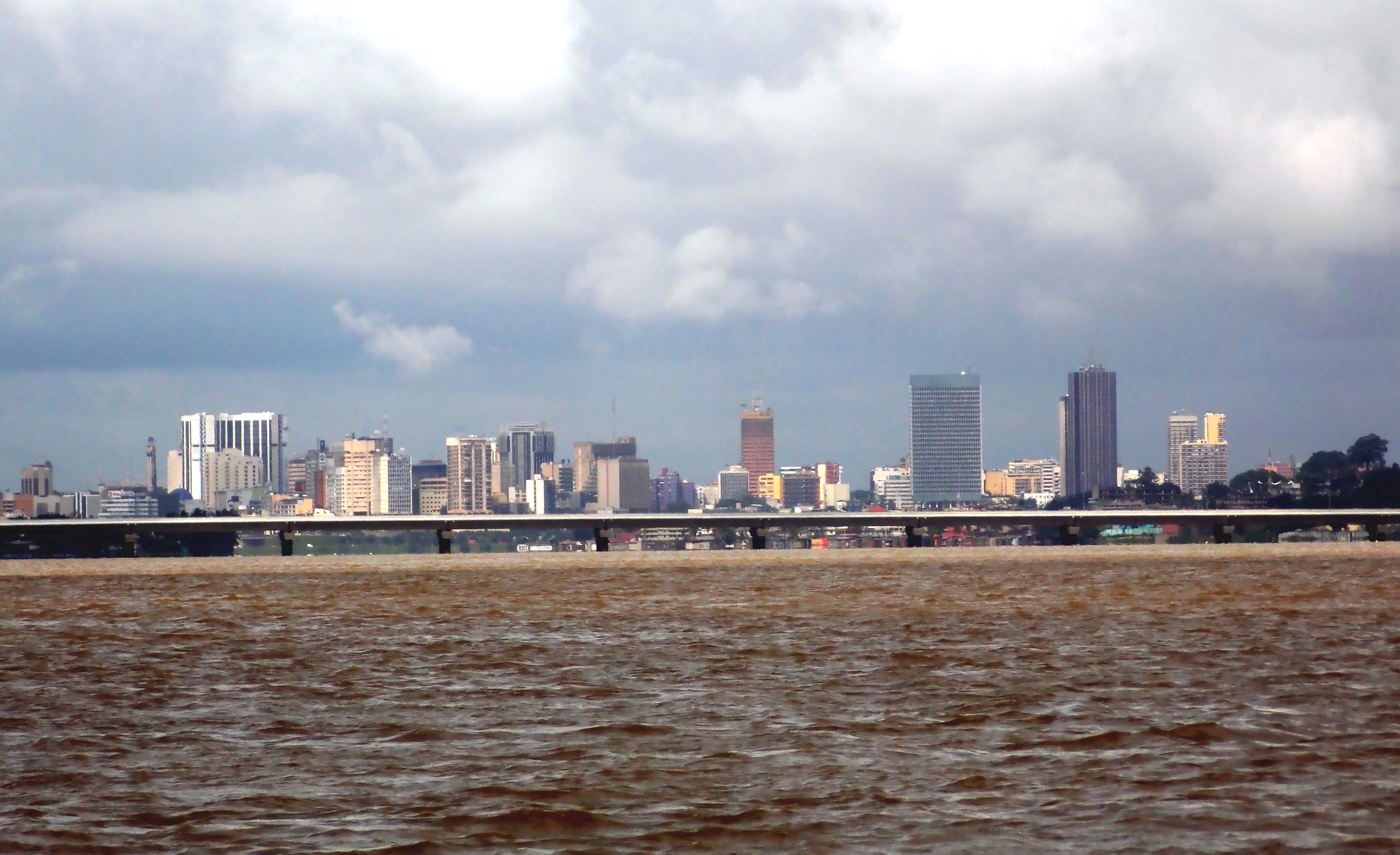 Silhouette du pont Henri-Konan-Bédié, enjambant la lagune avec le Plateau en arrière plan.